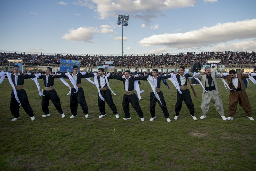 جشن نوروز ۱۳۹۸ در ورزشگاه ۲۲ گولان سنندج